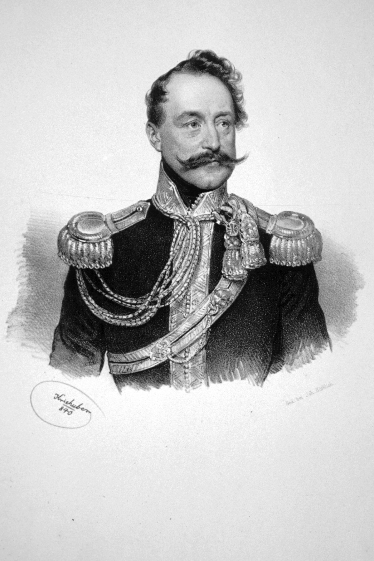 Johann Franz Schaaffgotsche (1792-1866), k. k. Feldzeugmeister, Ritter des Maria-Tneresien-Ordens